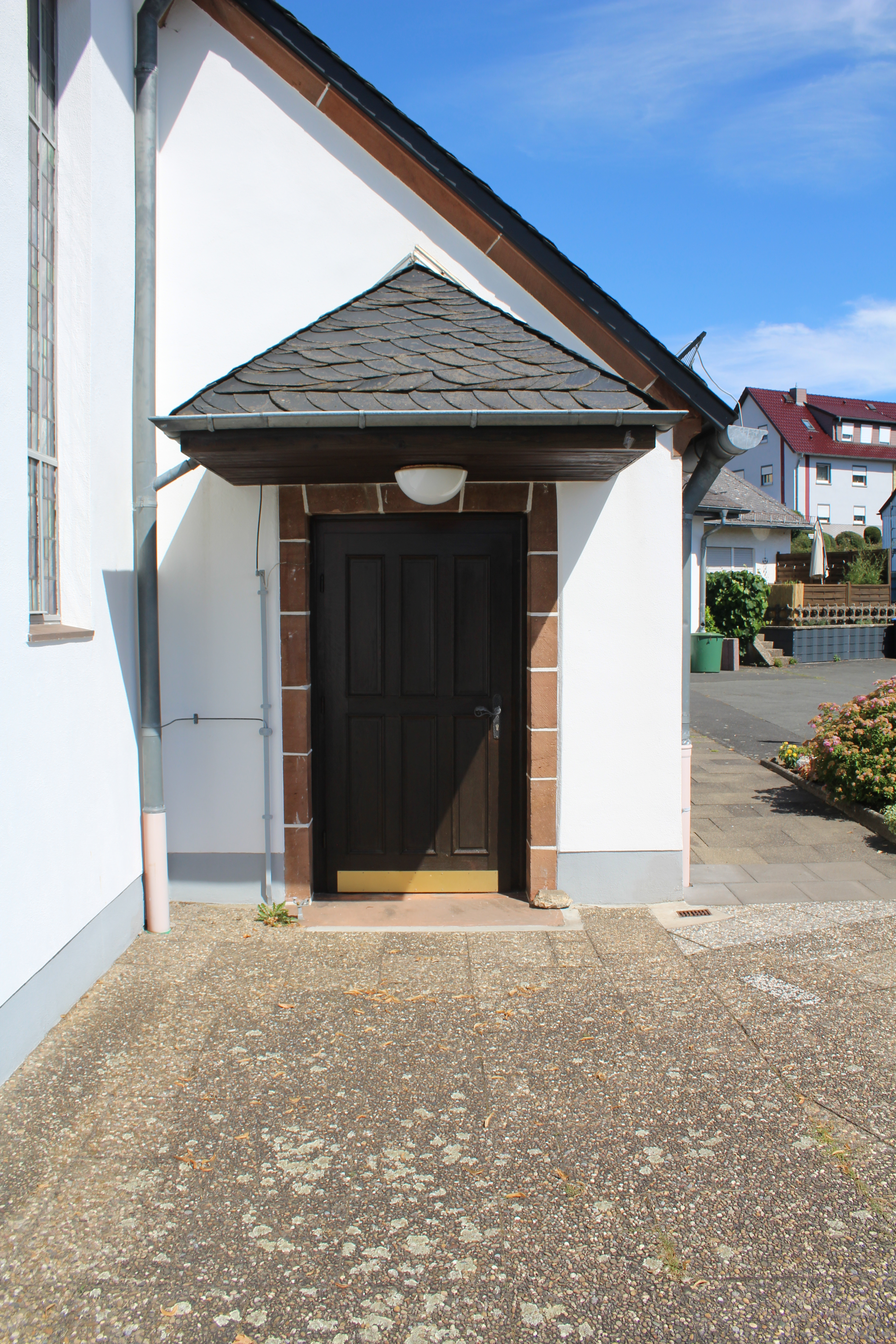 Evangelische Kirche Niederwetz, Gemeinde Schöffengrund, Hessen, Deutschland